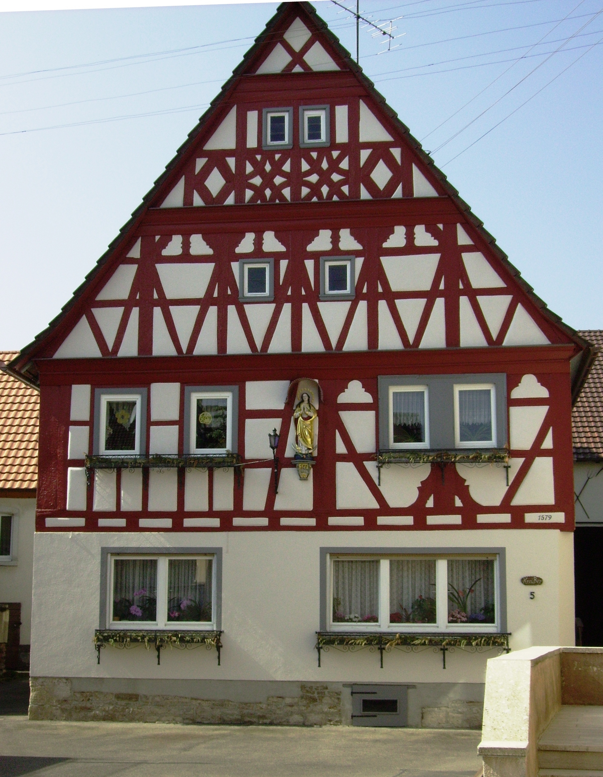 Fränkisches Fachwerkhaus in Röttingen